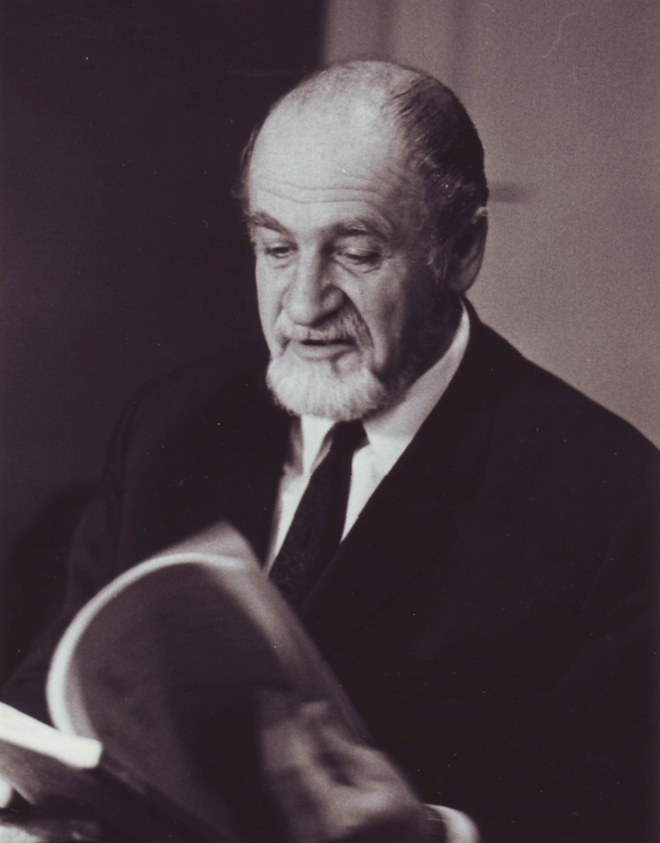 Felix le Breux (1918–1974) byl český herec